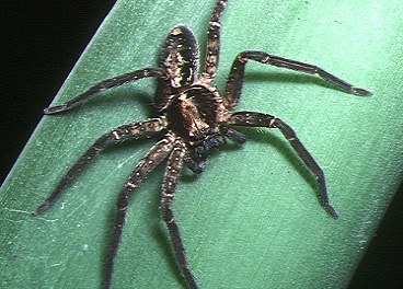 female Sinopoda okinawana from Okinawa.